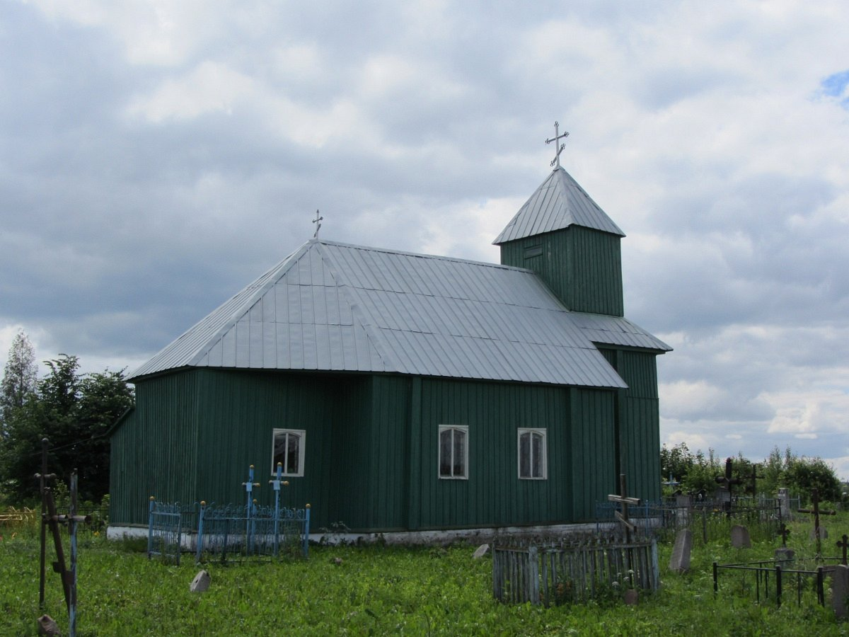 Дабрынёва. Свята-Раства-Багародзіцкая царква